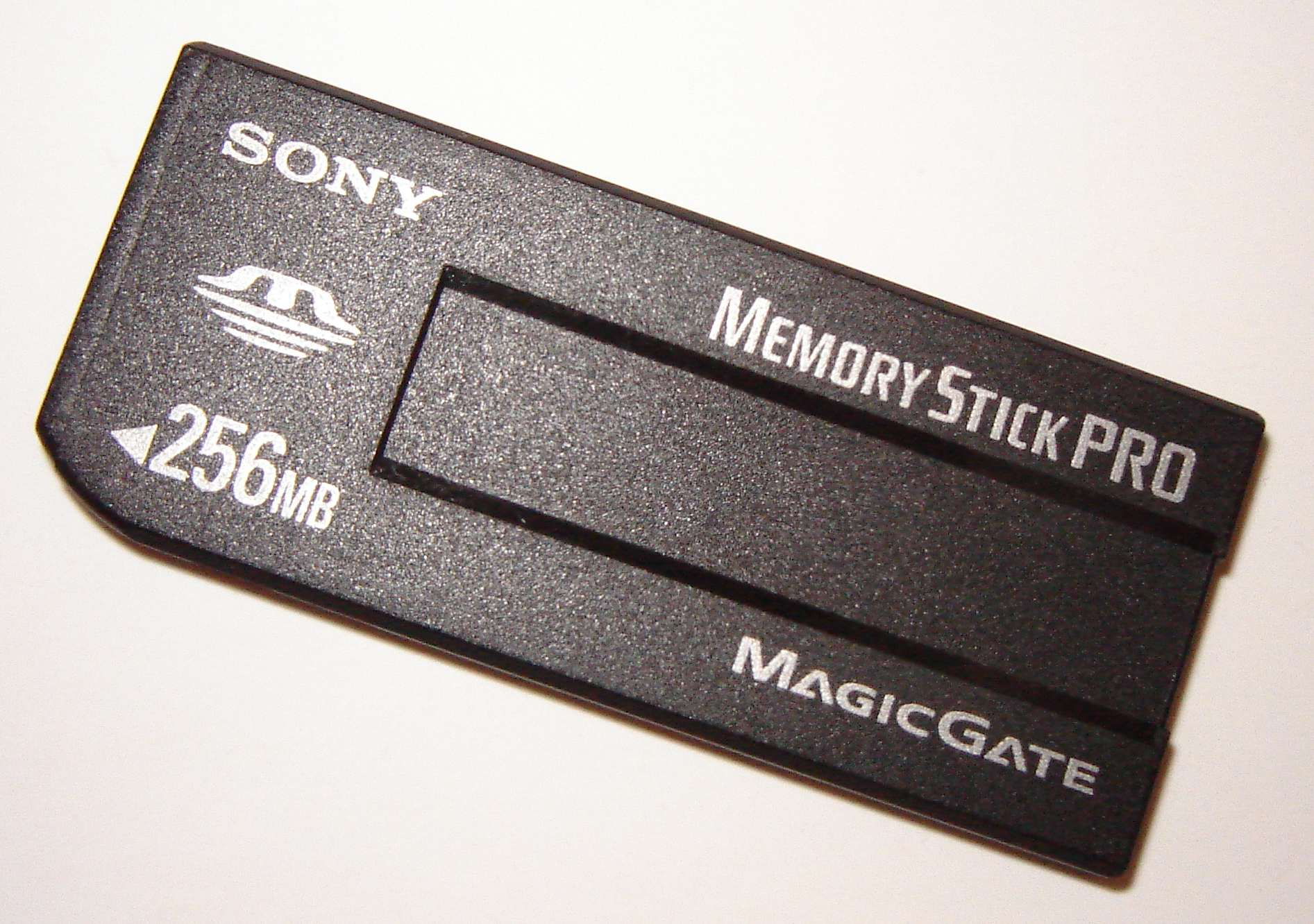 Karta pami?ci Memory Stick.